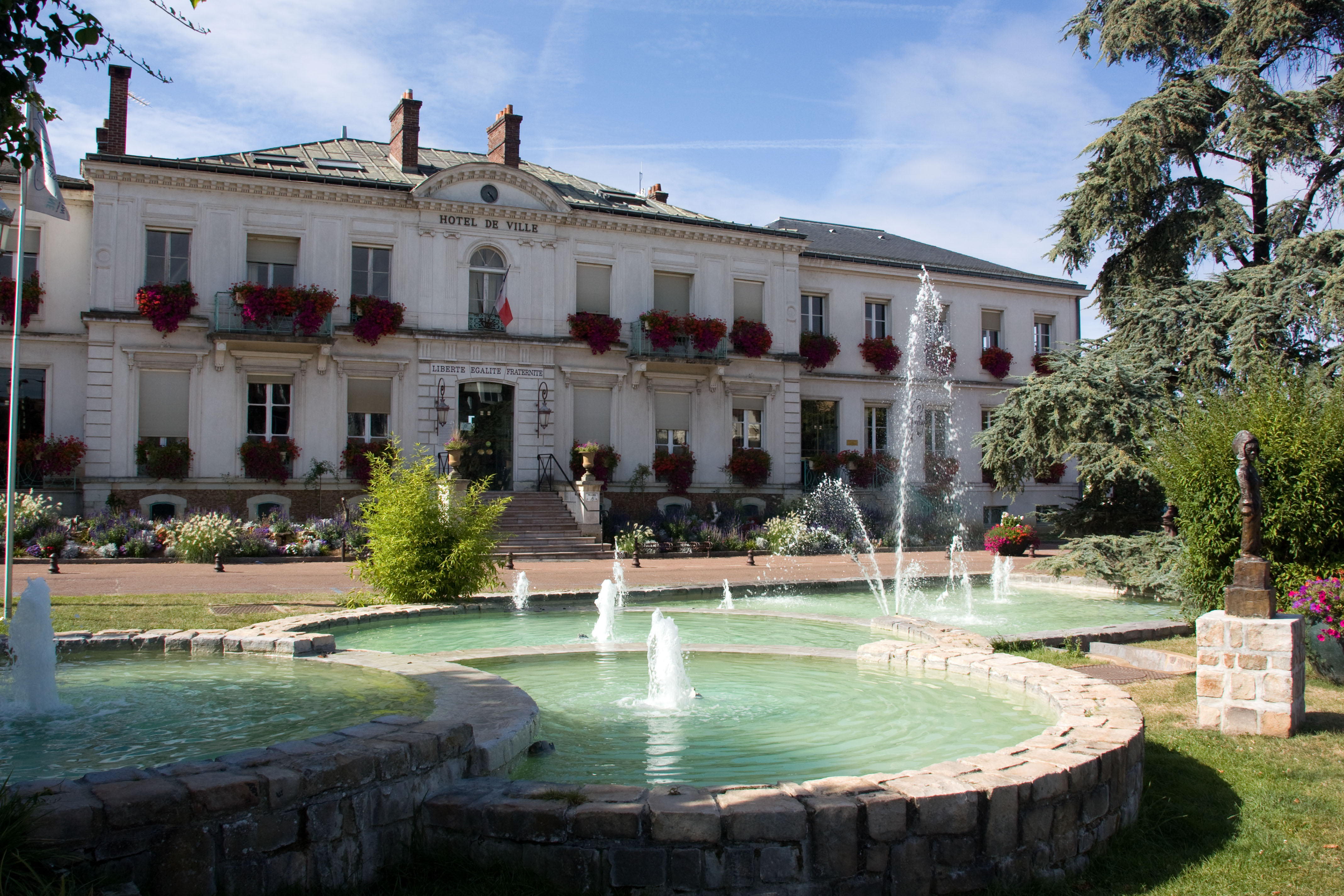 Mairie de Viry-Châtillon, Viry-Châtillon, Essonne, France